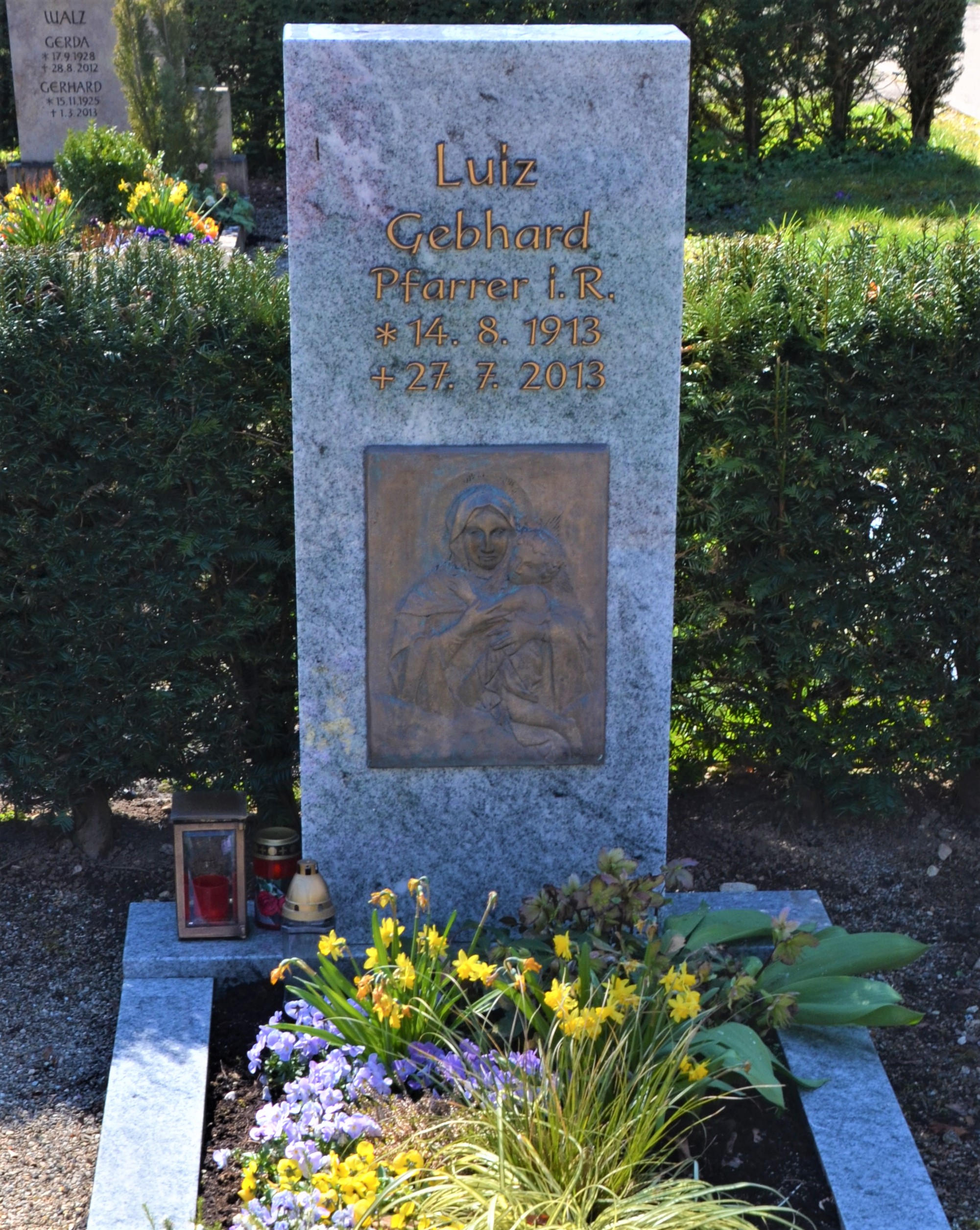 Grabmal von Pfarrer Gebhard Luiz auf dem Lenhardsfriedhof Schwäbisch Gmünd